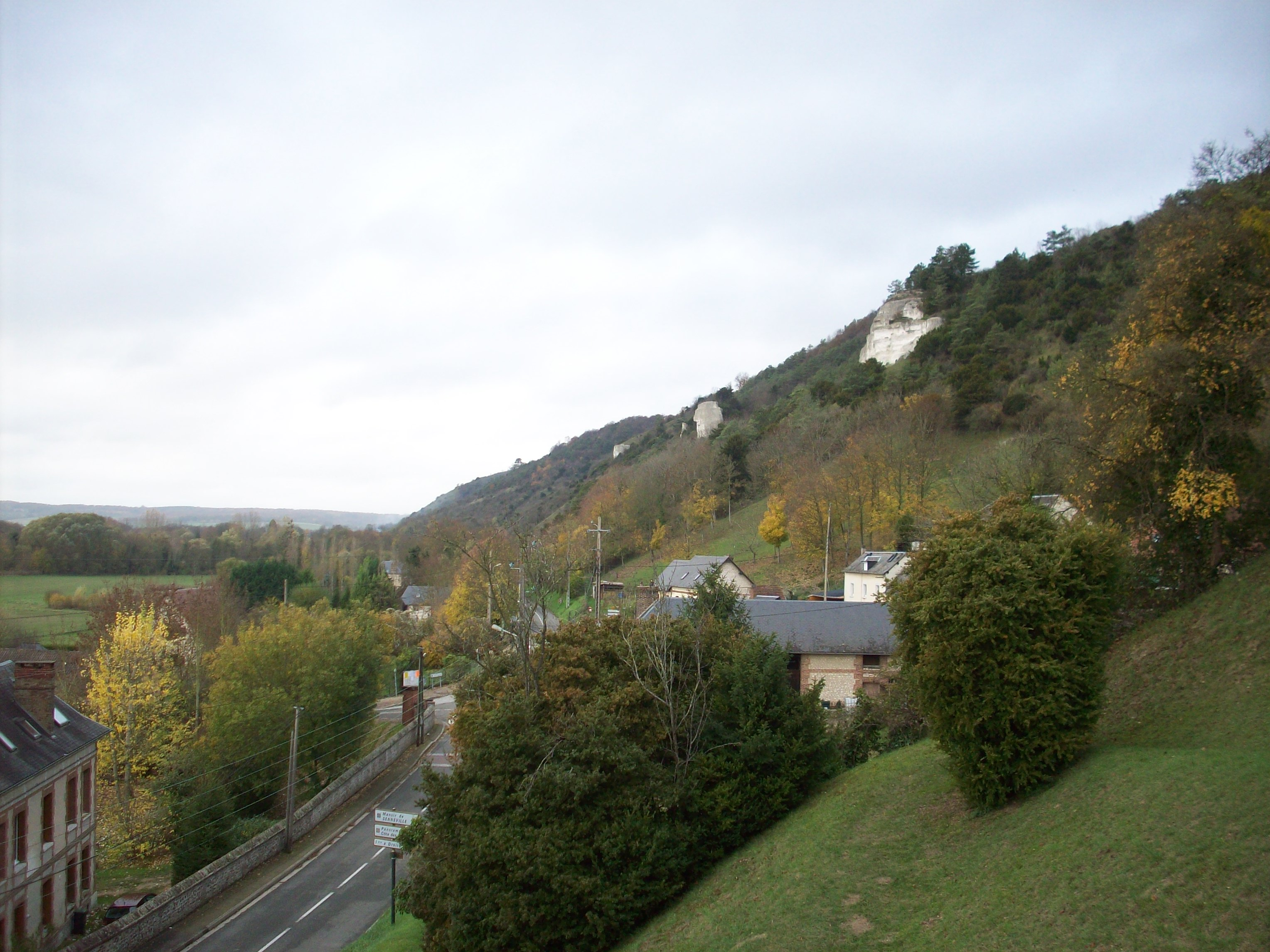 Côteaux des Deux-Amants